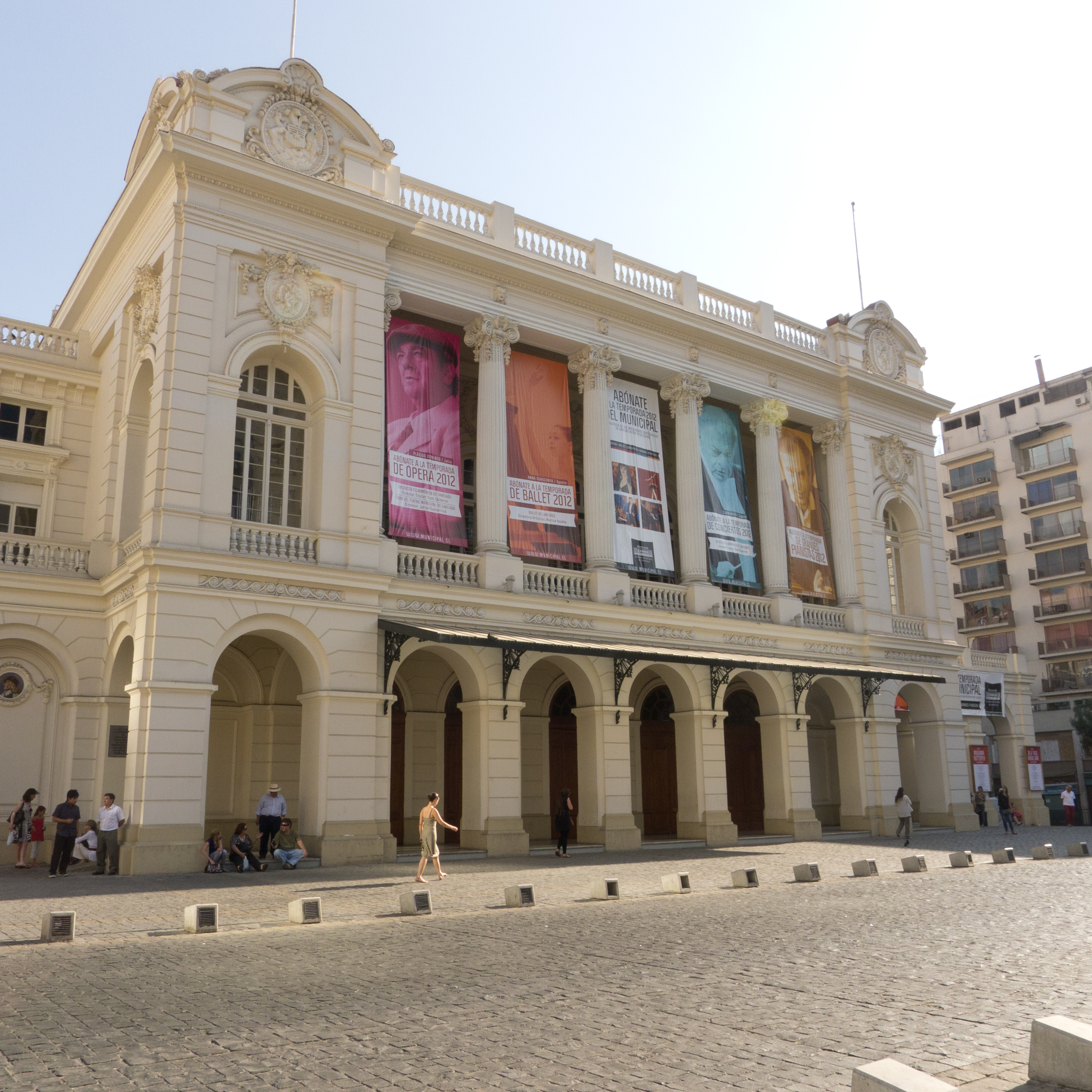 Teatro Municipal de Santiago This is a photo of a national monument in Chile: 208